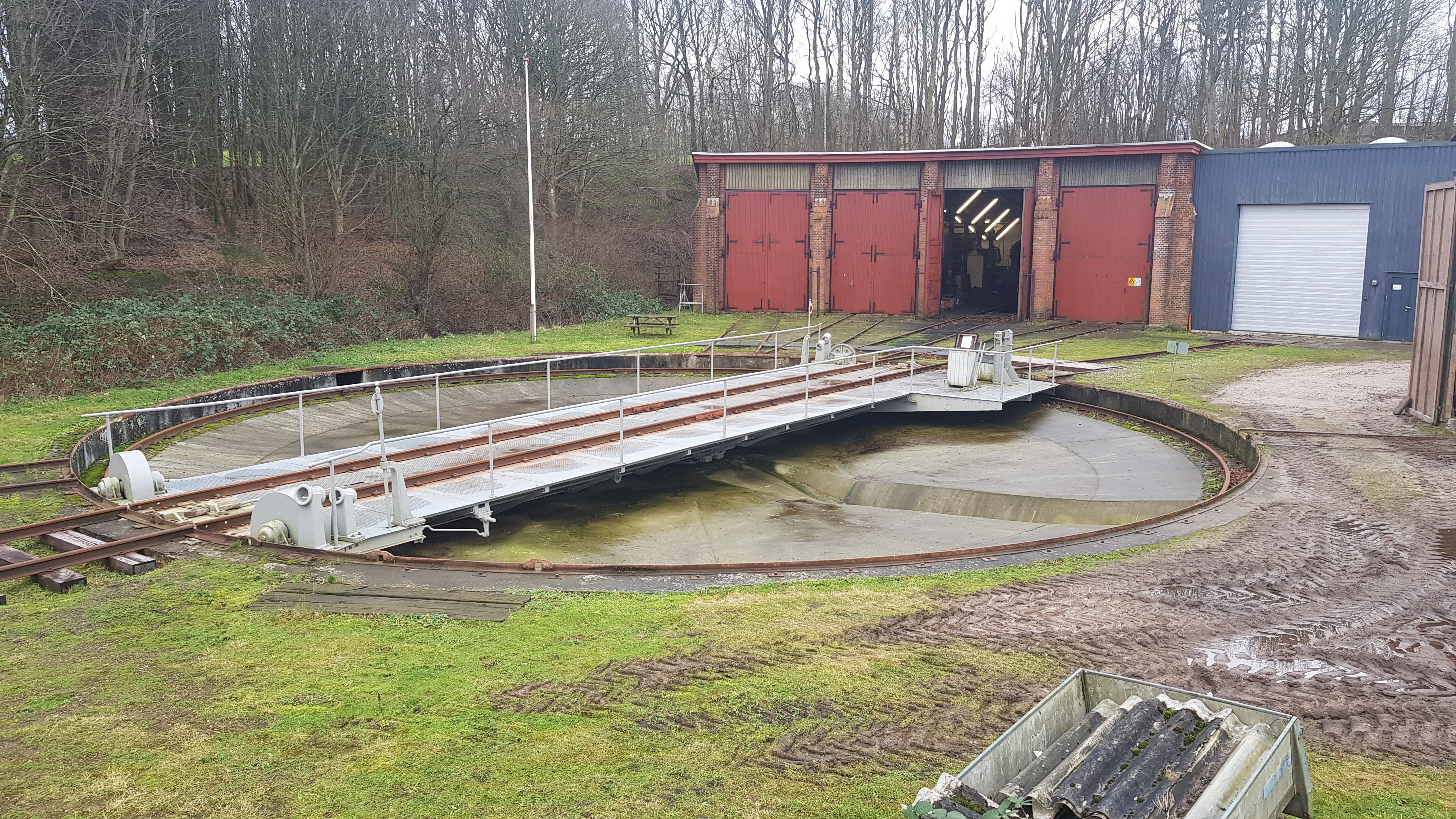 Lunderskov remise